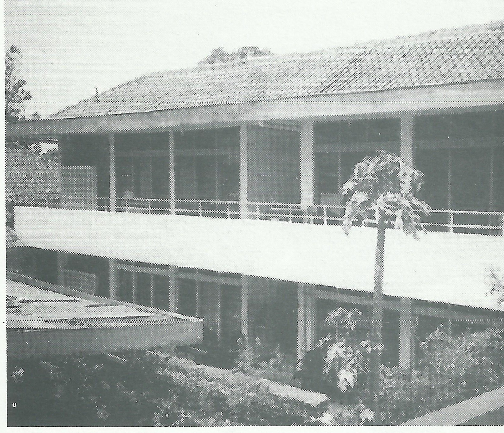 Bangunan kuti lama sesaat sebelum direnovasi.